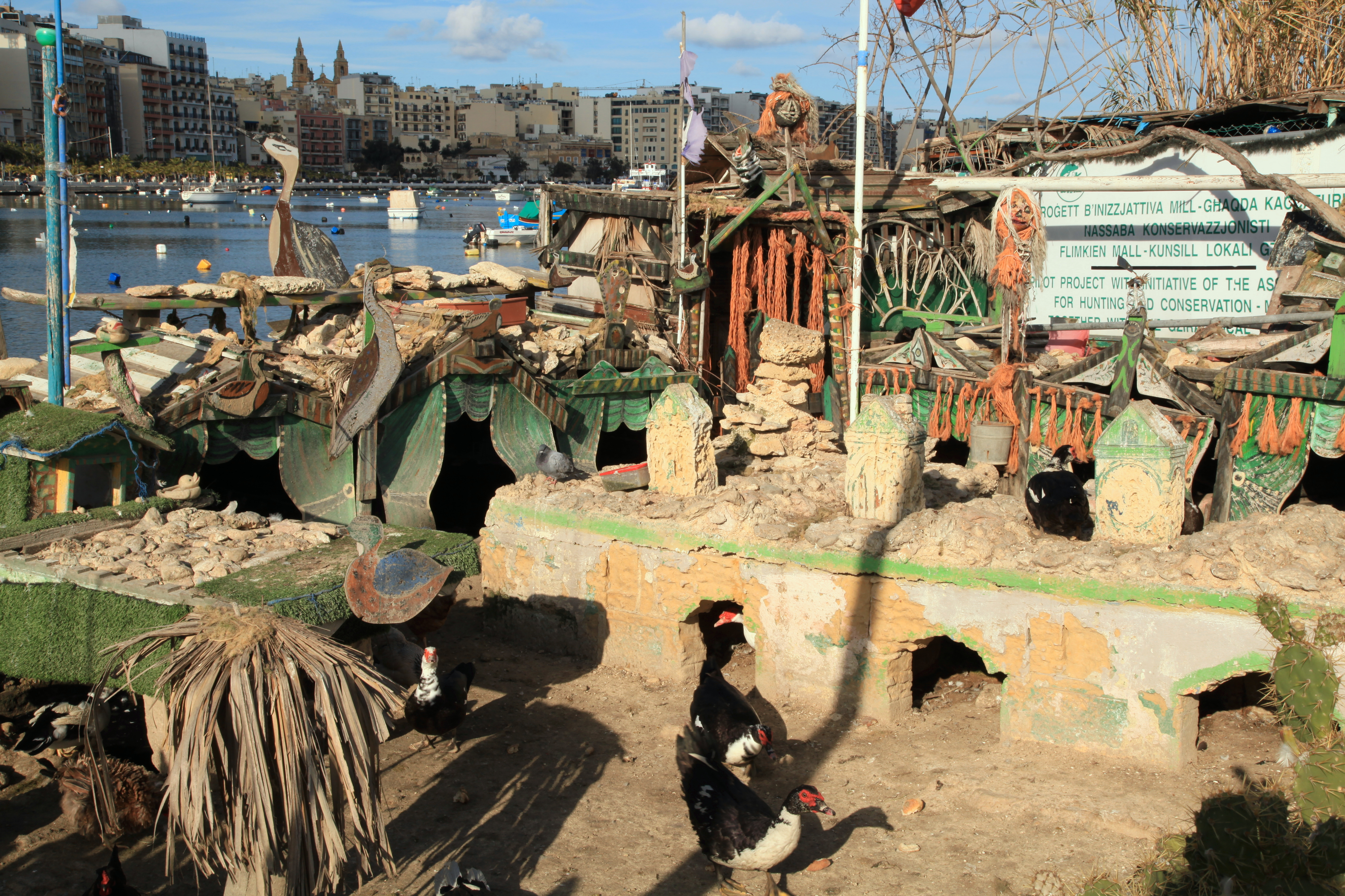 Duck Village at Triq Il-Forti Manoel, Manoel Island in Gżira, Malta